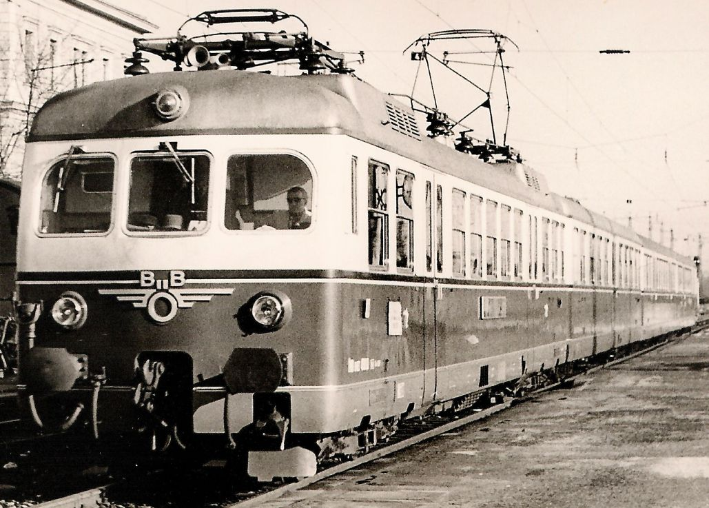 Schnelltriebwagen 4130 der ÖBB als "Wörthersee" München-Klagenfurt in München Hbf